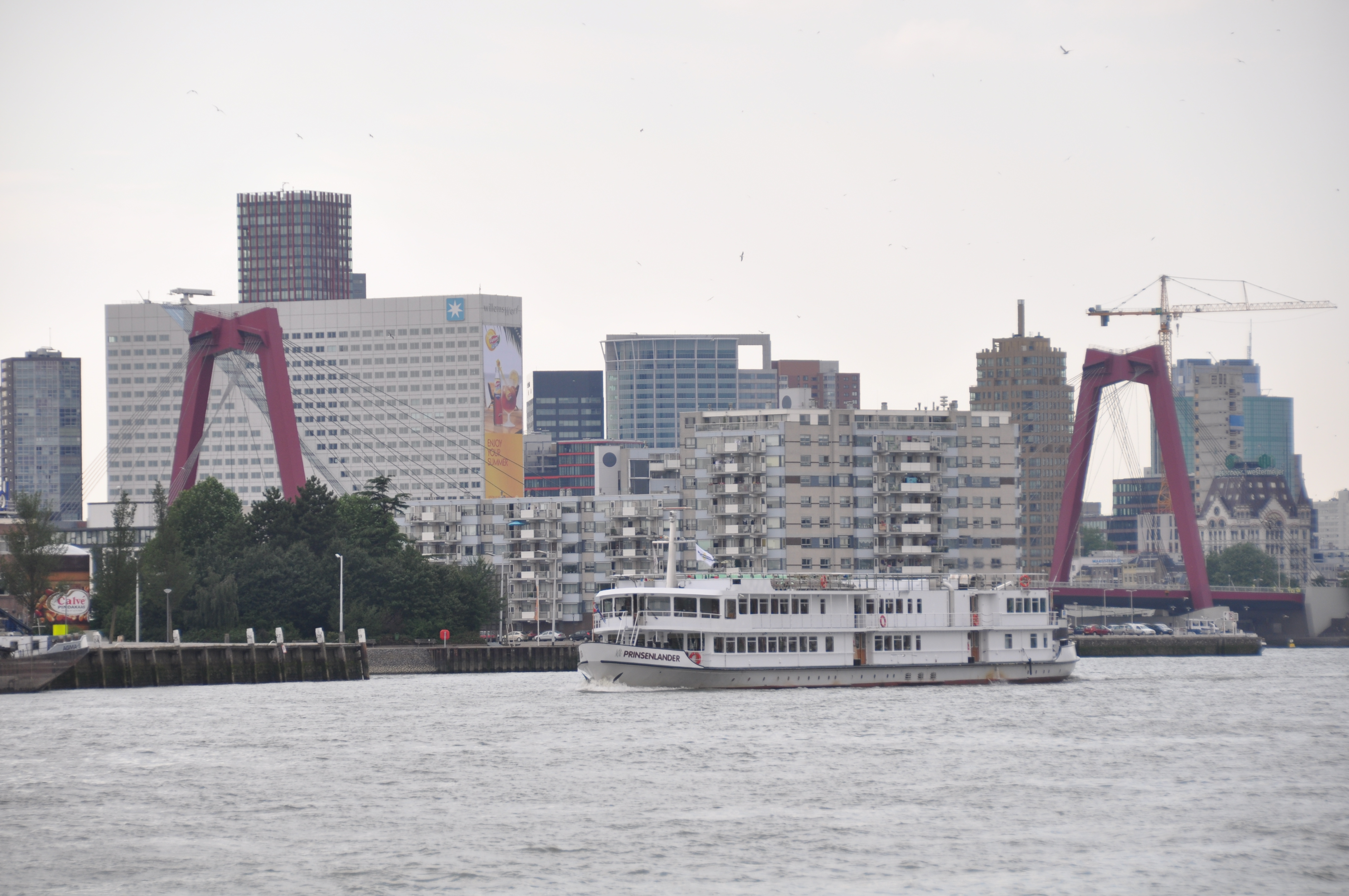 De PRINSENLANDER voor de stad op de Nieuwe Maas in Rotterdam.